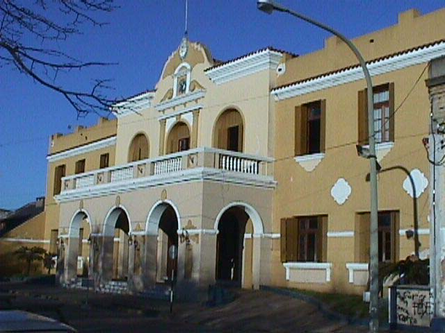 Municipalidad de Carlos Casares